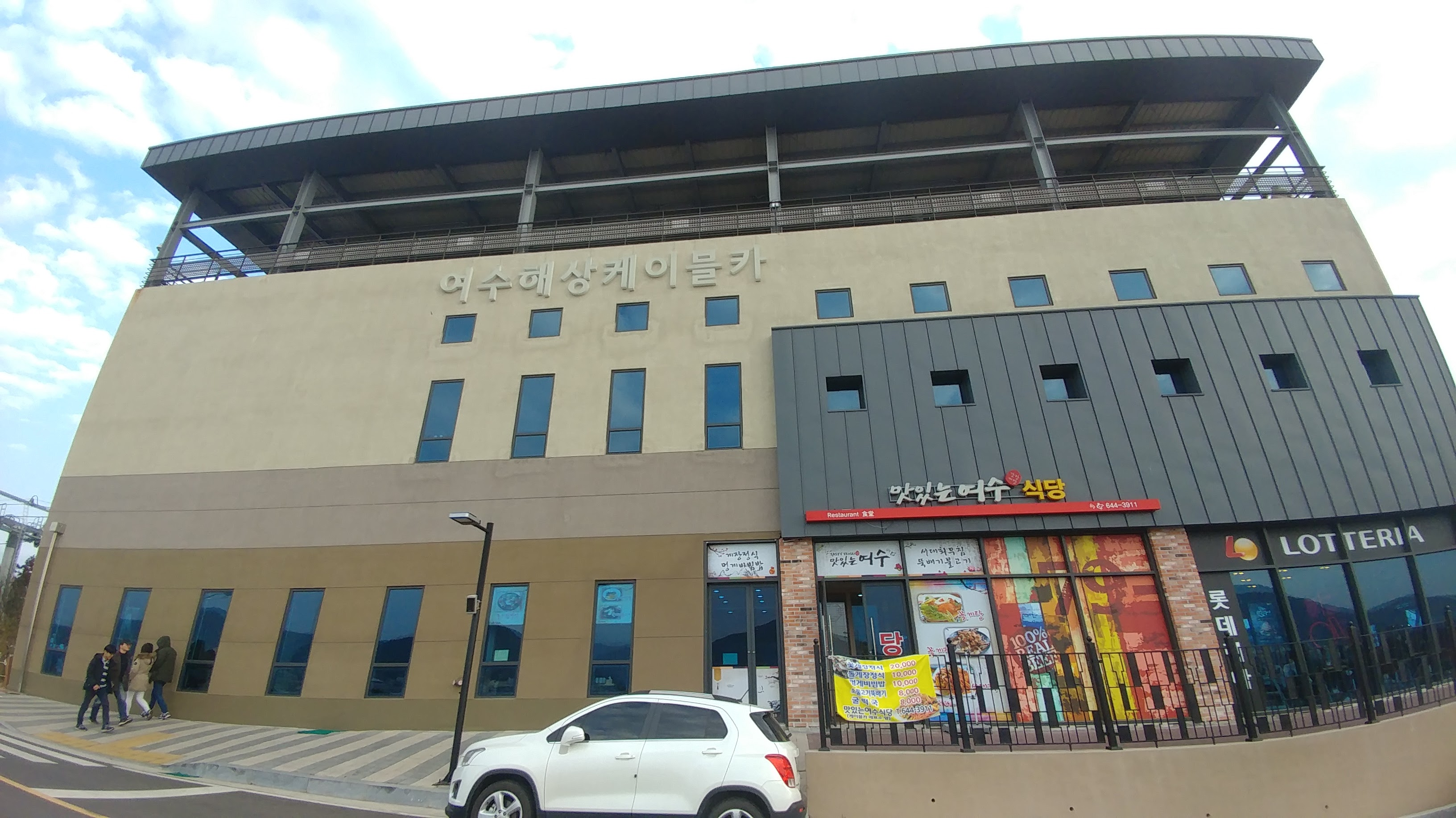 여수케이블카 정류장